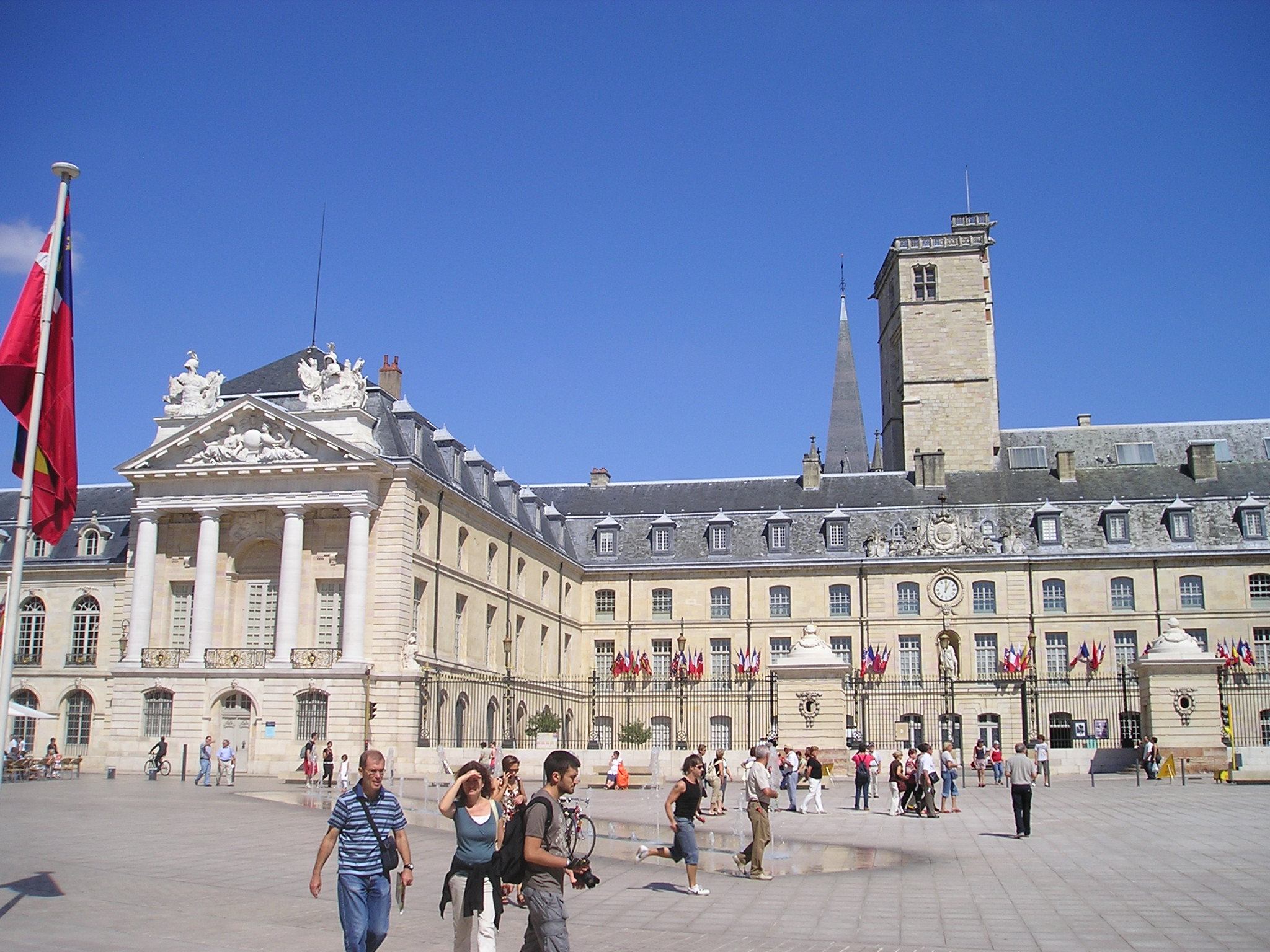 Dijon Herzoglicher Palast